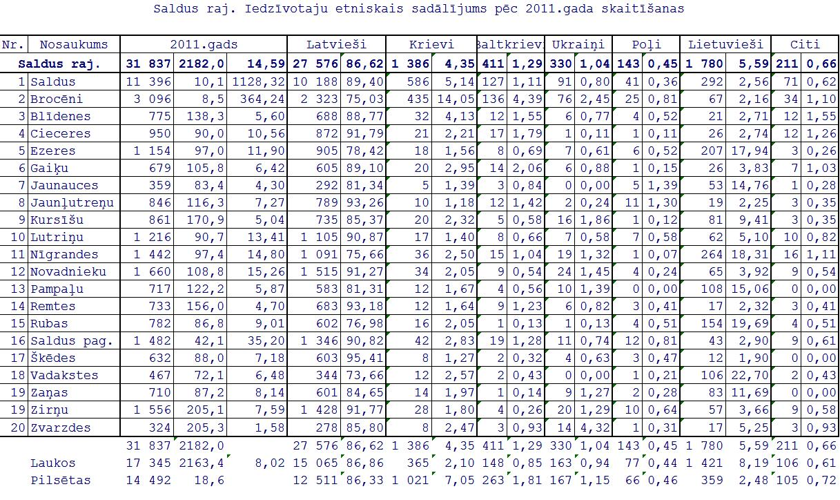 Latvijas 2011 gada tautas skaitīšanas dati